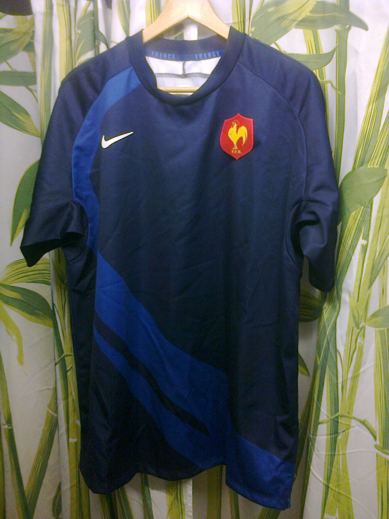 Maillot de l'équipe nationale française de rugby à la Coupe du Monde 2007.